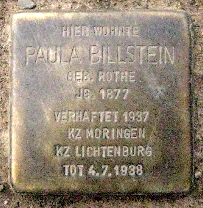 Stolperstein3-ritterstr.189-krefeld